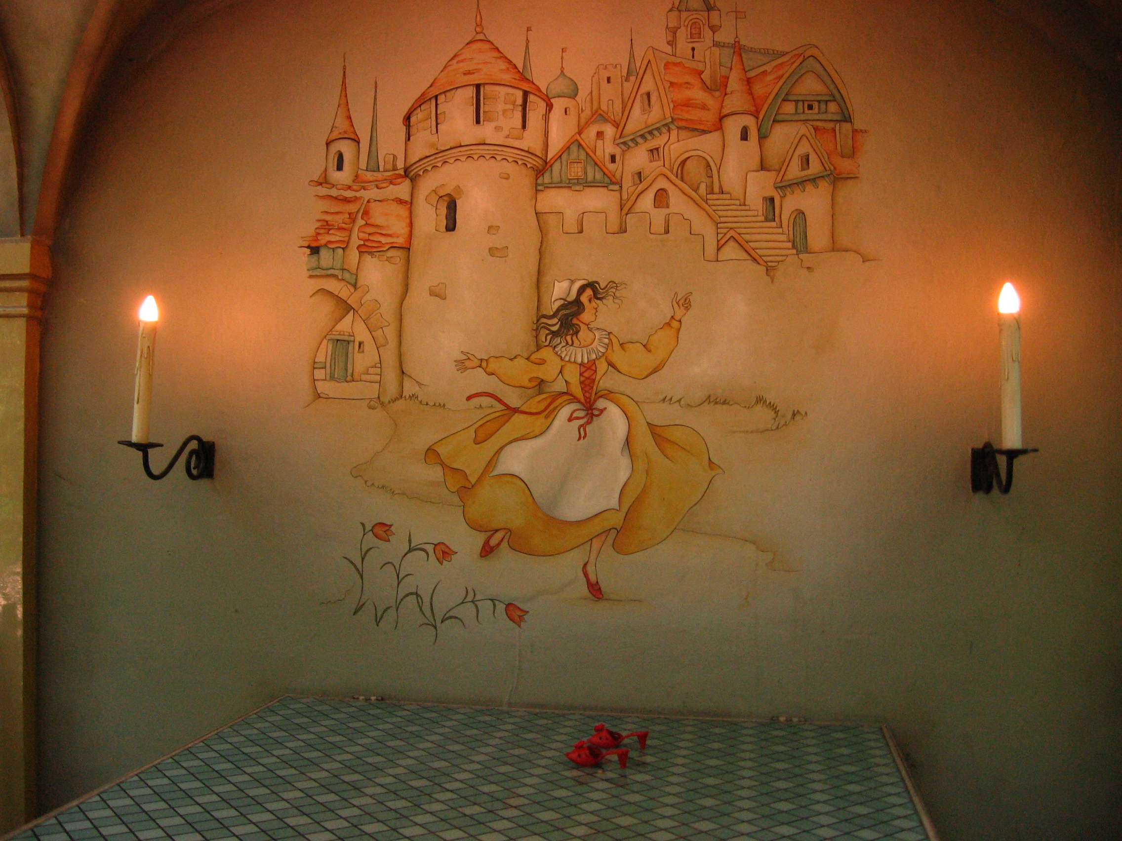 Rode Schoentjes - Efteling